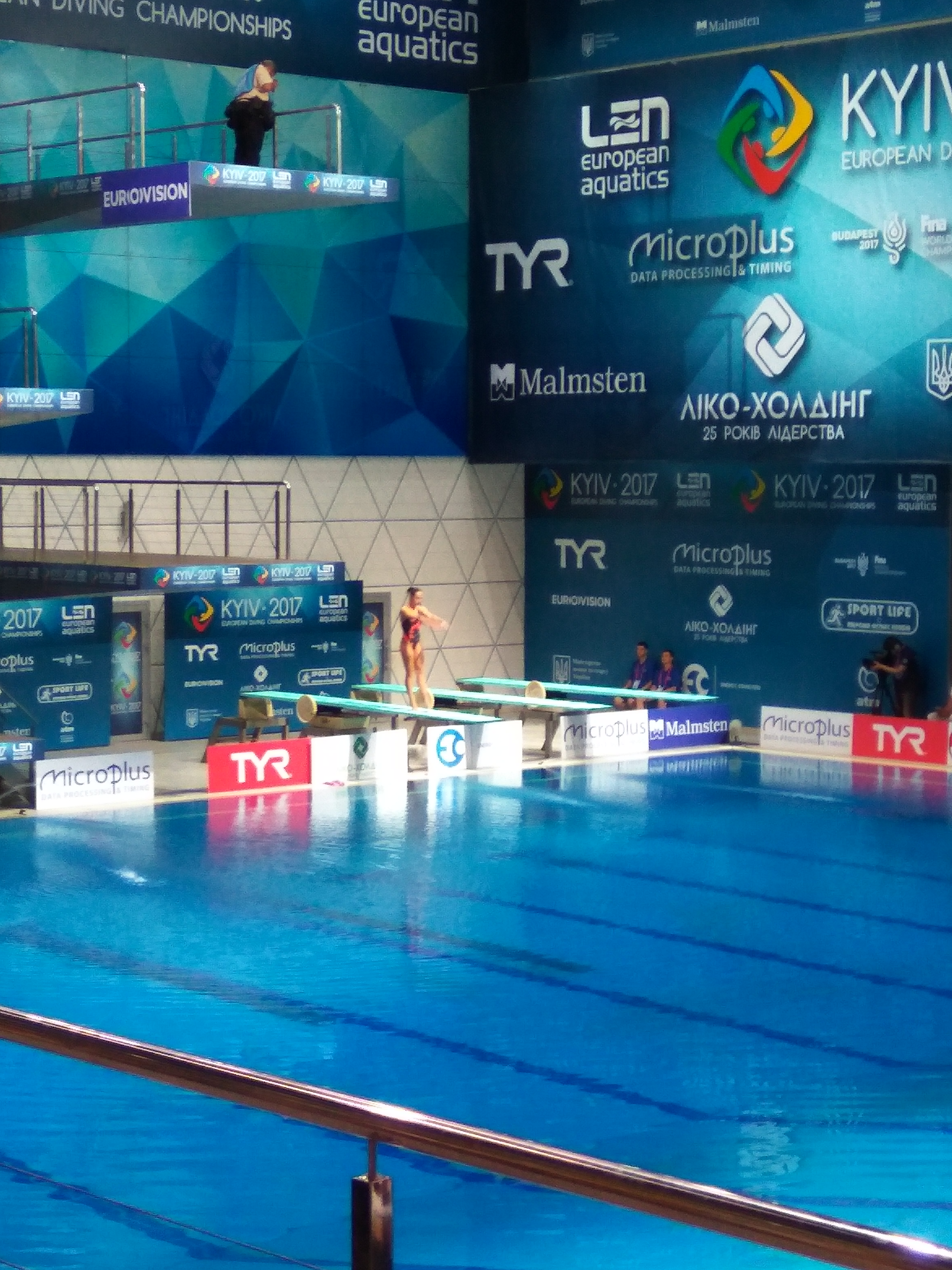 Чемпіонат Європи зі стрибків у воду 2017, жінки, трамплін 1 метр.